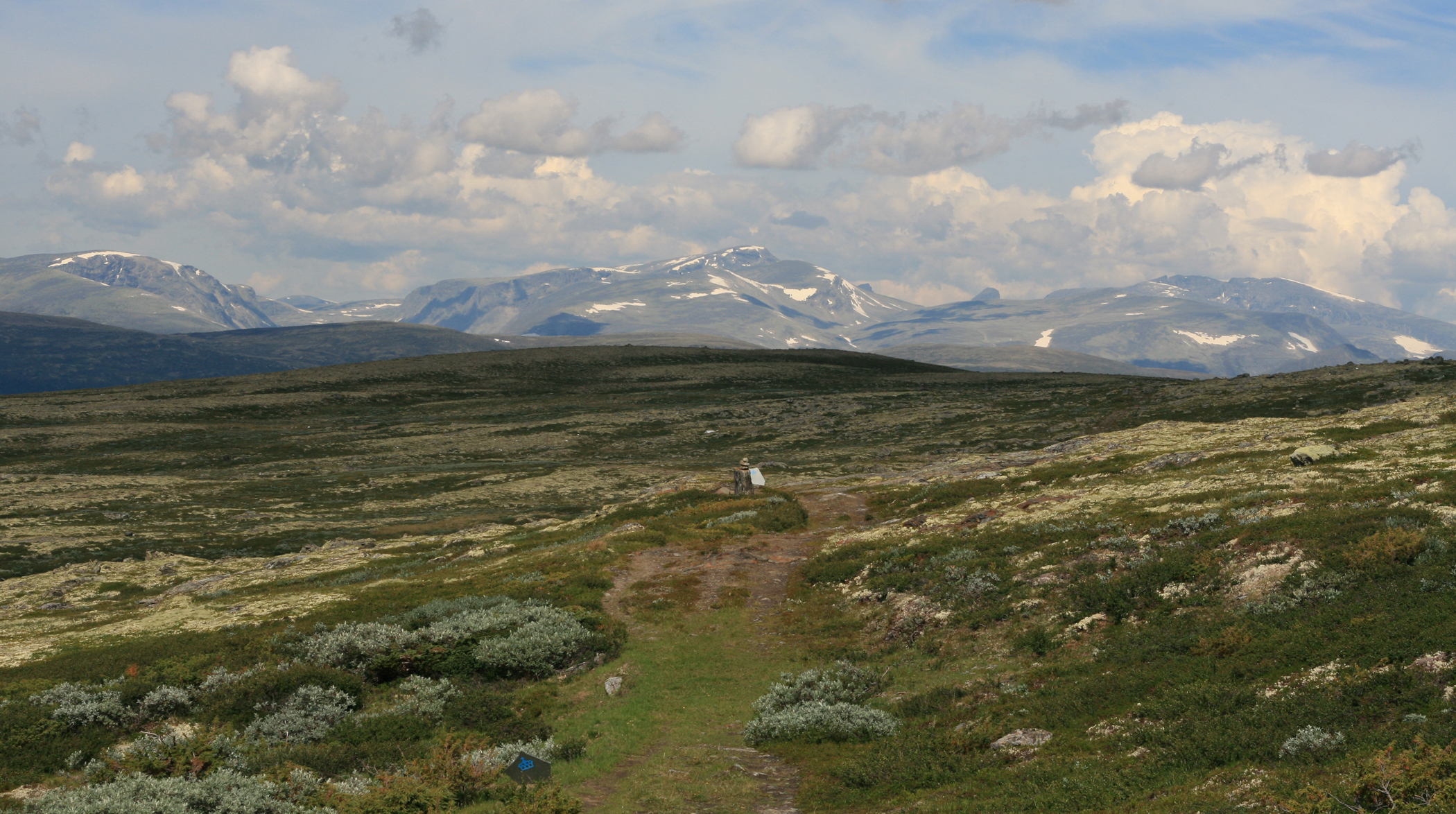 Pilgrimsleden over Dovre med Snøhetta i bakgrunnen.